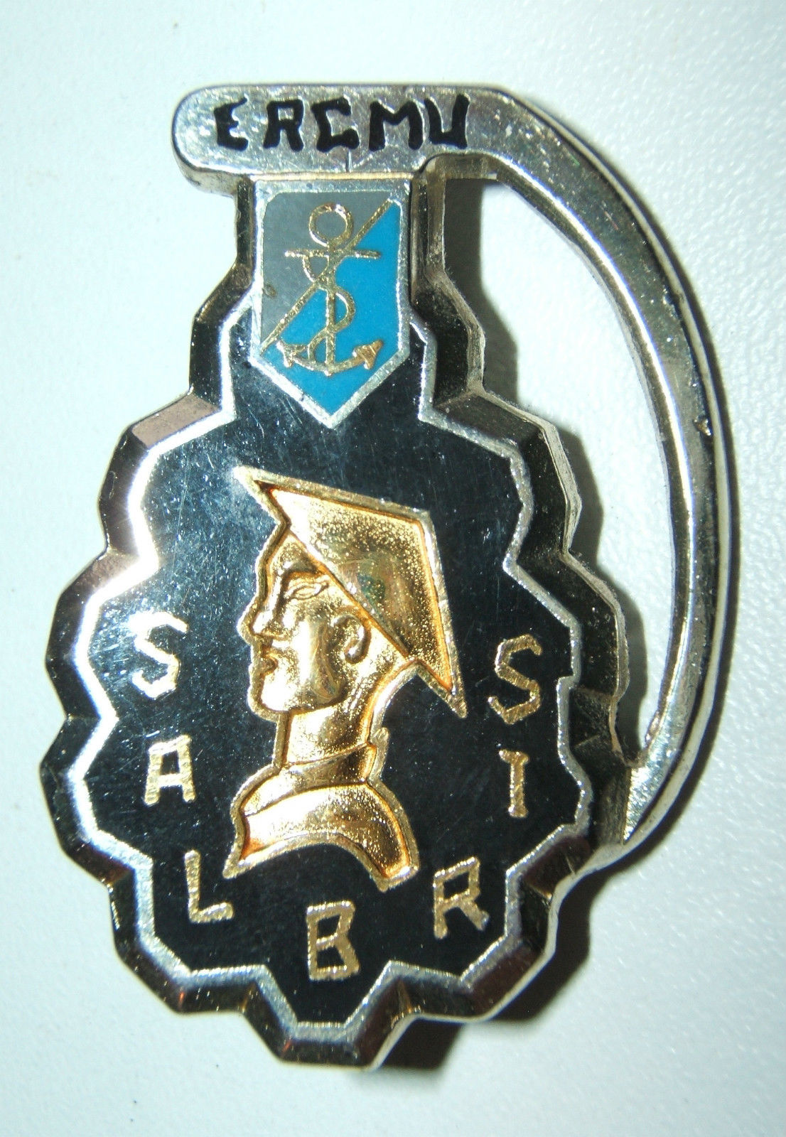 Insigne de l' ERG Munitions stationnée à Salbris.